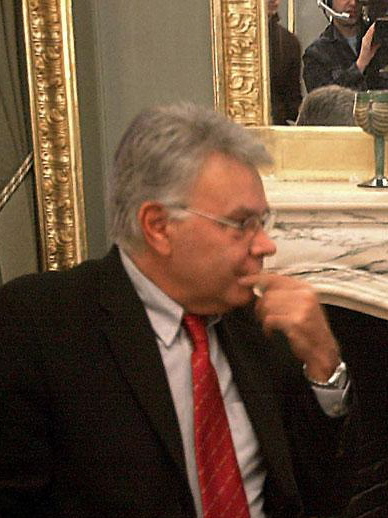 Felipe Gonzalez, ex-presidente de España.